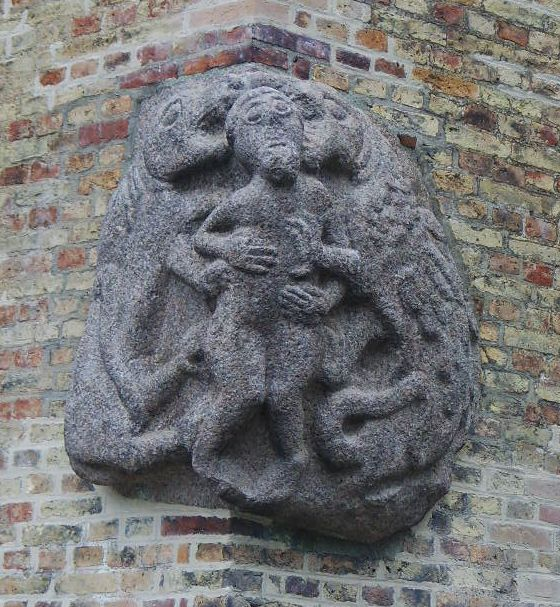 I dagens Oslo domkirke finns et relieff som er murt inn i hjørnet av tårnfoten, på høyre side av hovedinngangen. Relieffet viser et menneske som attakkeres av en drage og en løve. Billedsteinen, som skal være fra ca. 1100, ble funnet under utgravinger i Gamlebyen og stammer sannsynligvis fra St. Hallvardskatedralen.